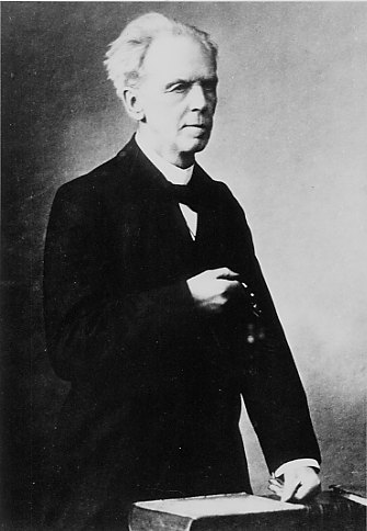 Ernst Christian Neumann (1834–1914), Hämatologe und Pathologe der Universität Königsberg. Am Stehpult Universität Königsberg, um 1895